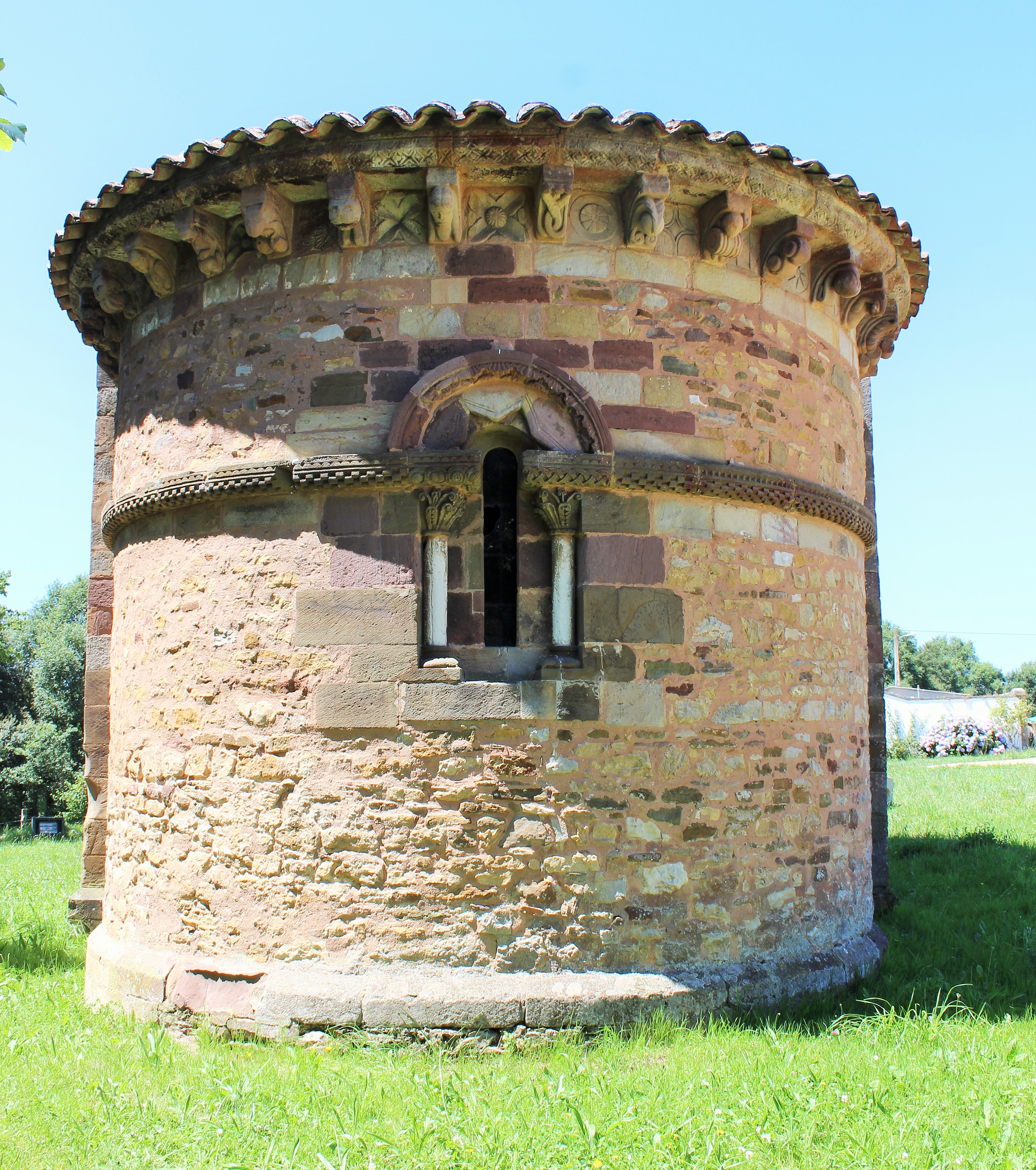 Fachada oriental formada por el ábside